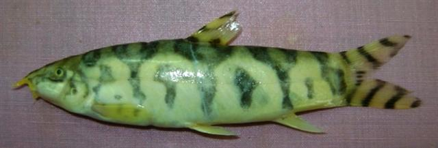 Botia lohachata, Pakistan